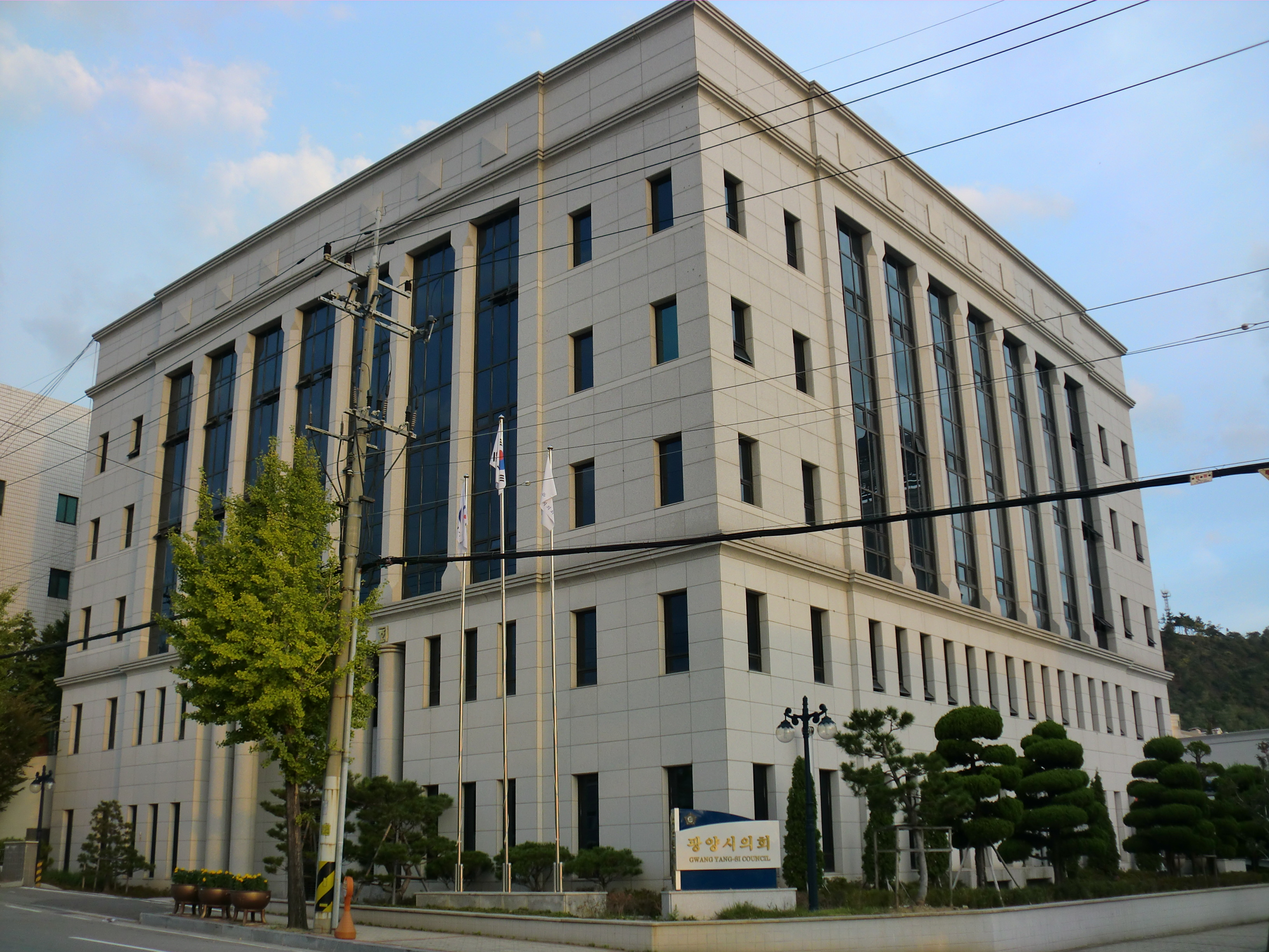 광양시의회